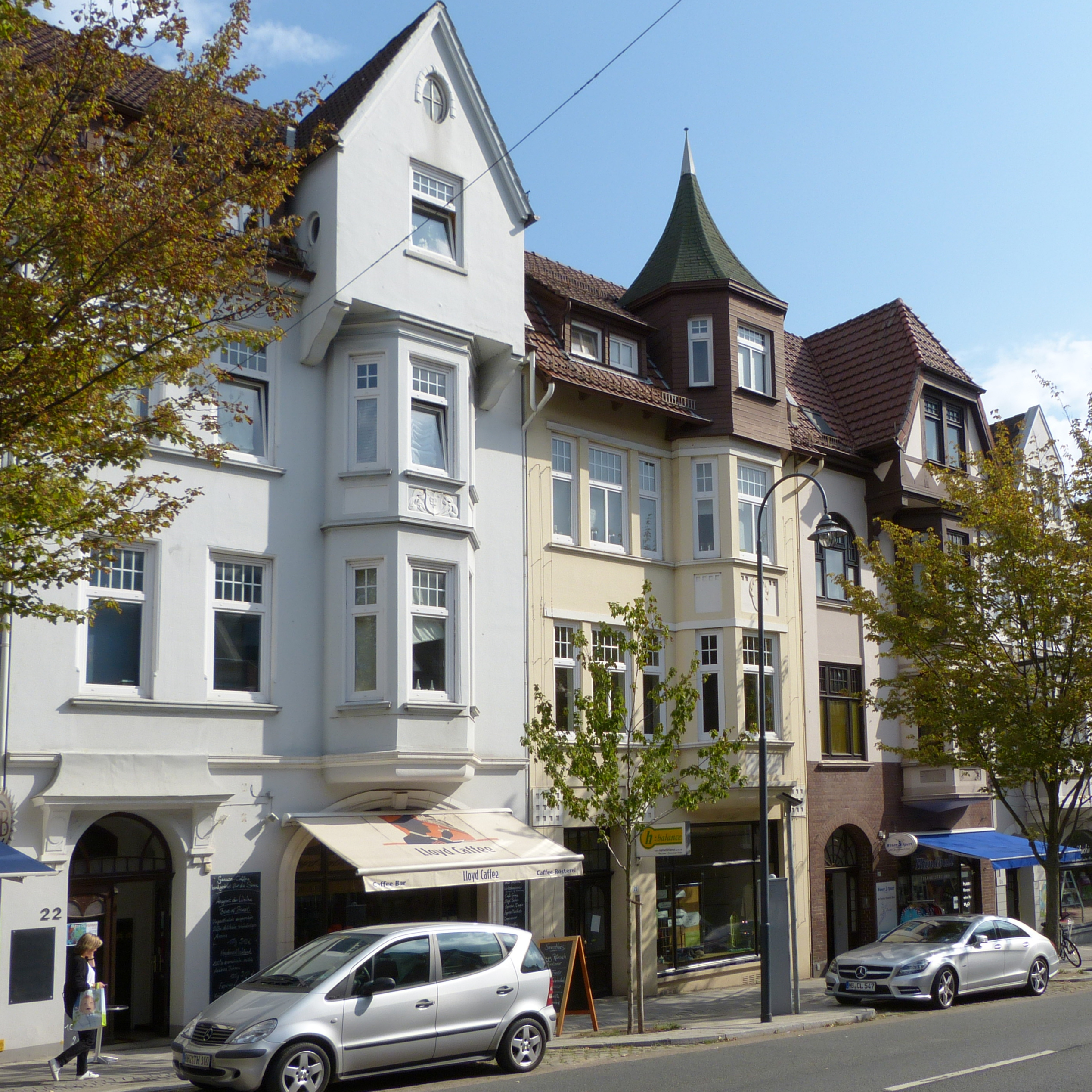 Wohnhausgruppe in Bremen, Reeder-Bischoff-Straße 16Die Denkmalgruppe ist ein geschütztes Kulturdenkmal in der Freien Hansestadt Bremen, mit der Nr. 1281 beim Landesamt für Denkmalpflege registriert.